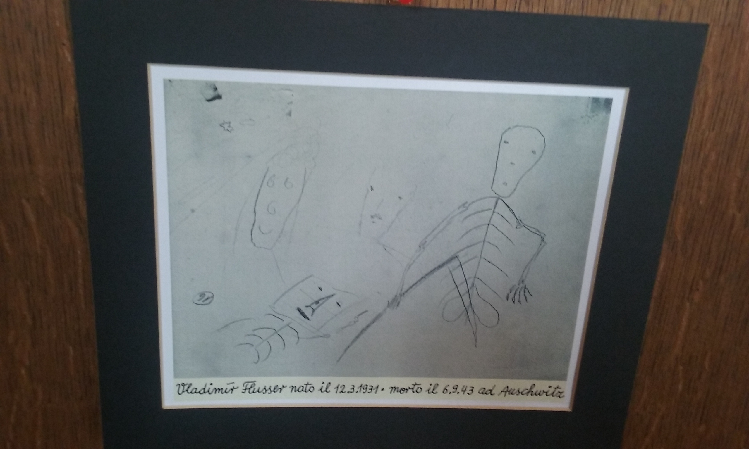 Dipinto realizzato da un alunno di Friedl nato il 12/03/1931 e morto ad Auschwitz il 06/09/1943. La foto è stata scattata a Pisa nel gennaio del 2016 durante una mostra organizzata in onore di Friedl.